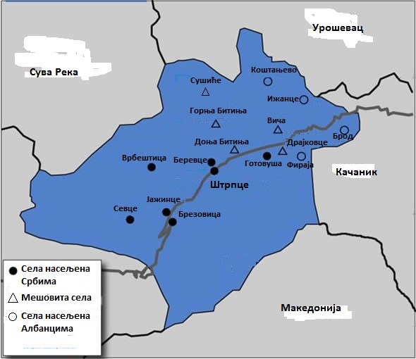 Национални састав и размештај села у општини Штрпце